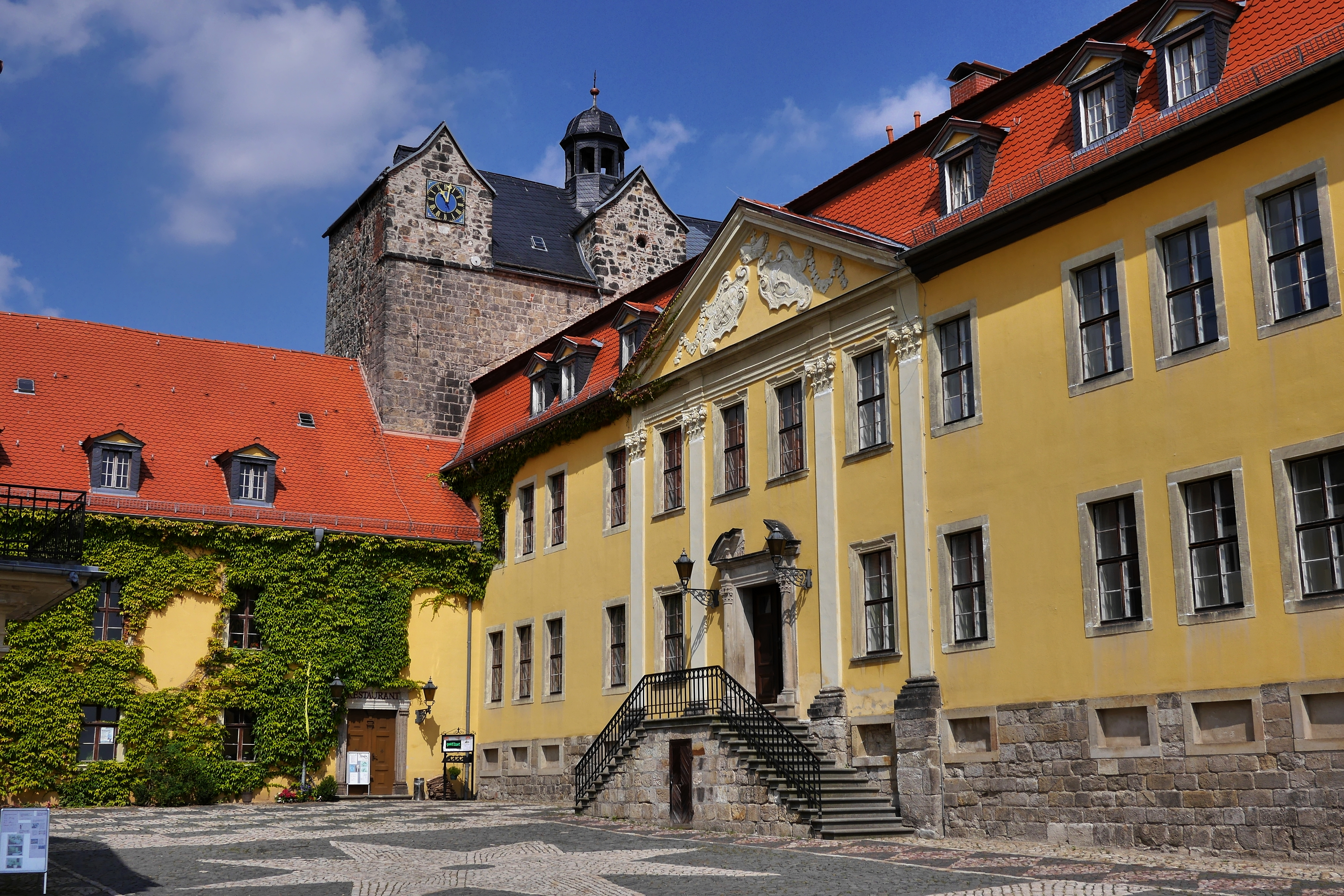 Schloss Ballenstedt, Ansicht von der Hofseite